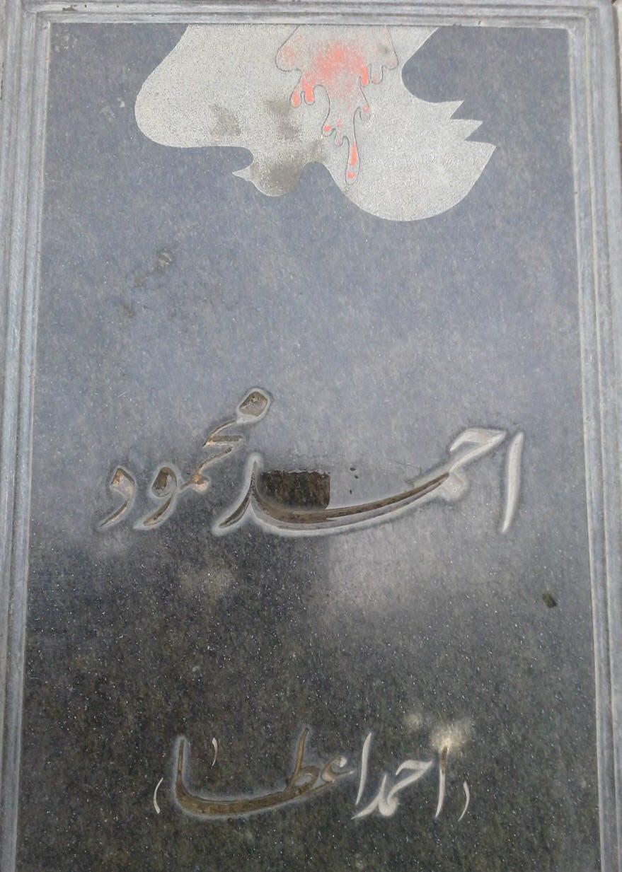 مزار احمد محمود در امامزاده طاهر کرج (عکس در سال 1392 گرفته شده است)